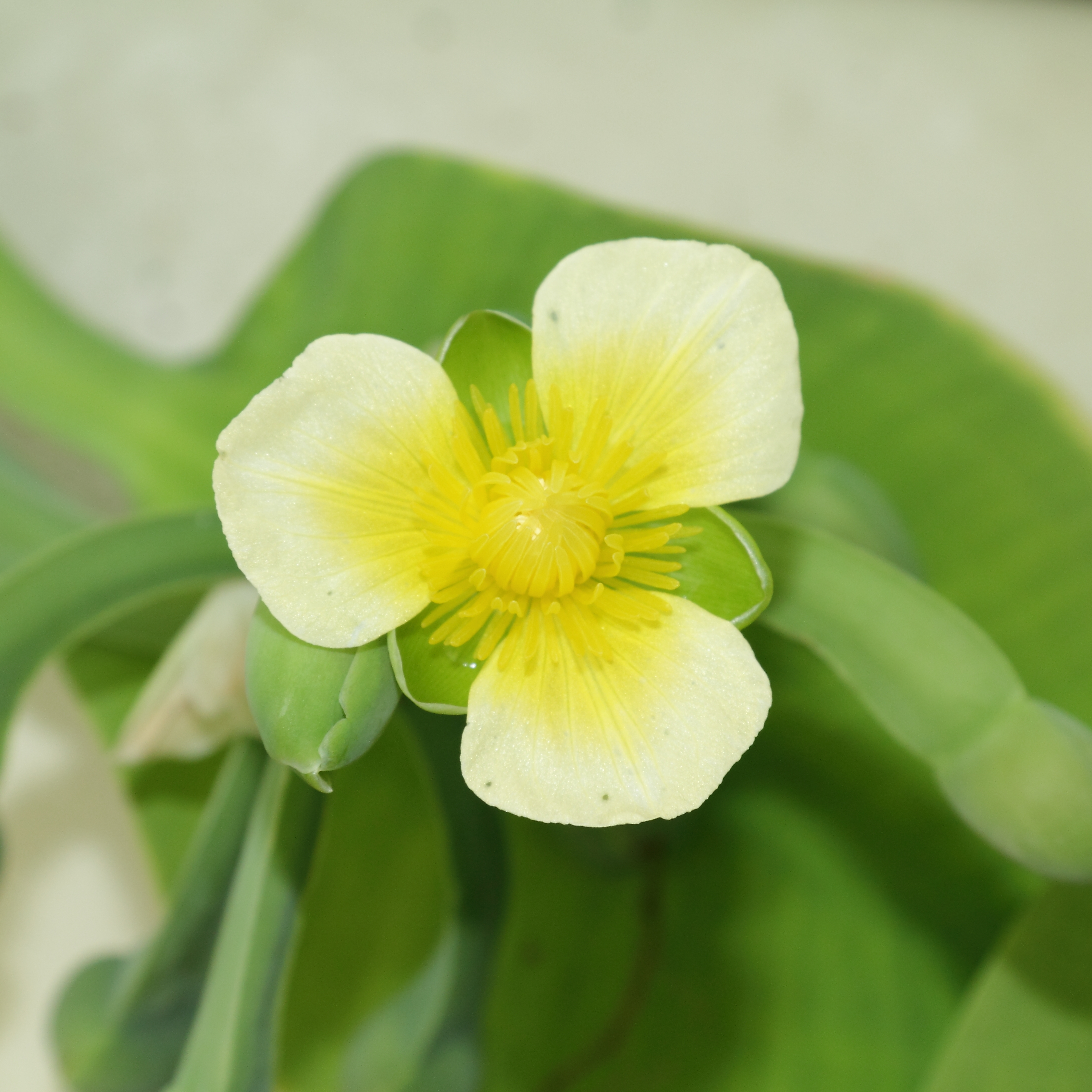 Limnocharis flava, identifierad med hjälp av befintlig skylt vid Bergianska trädgården.